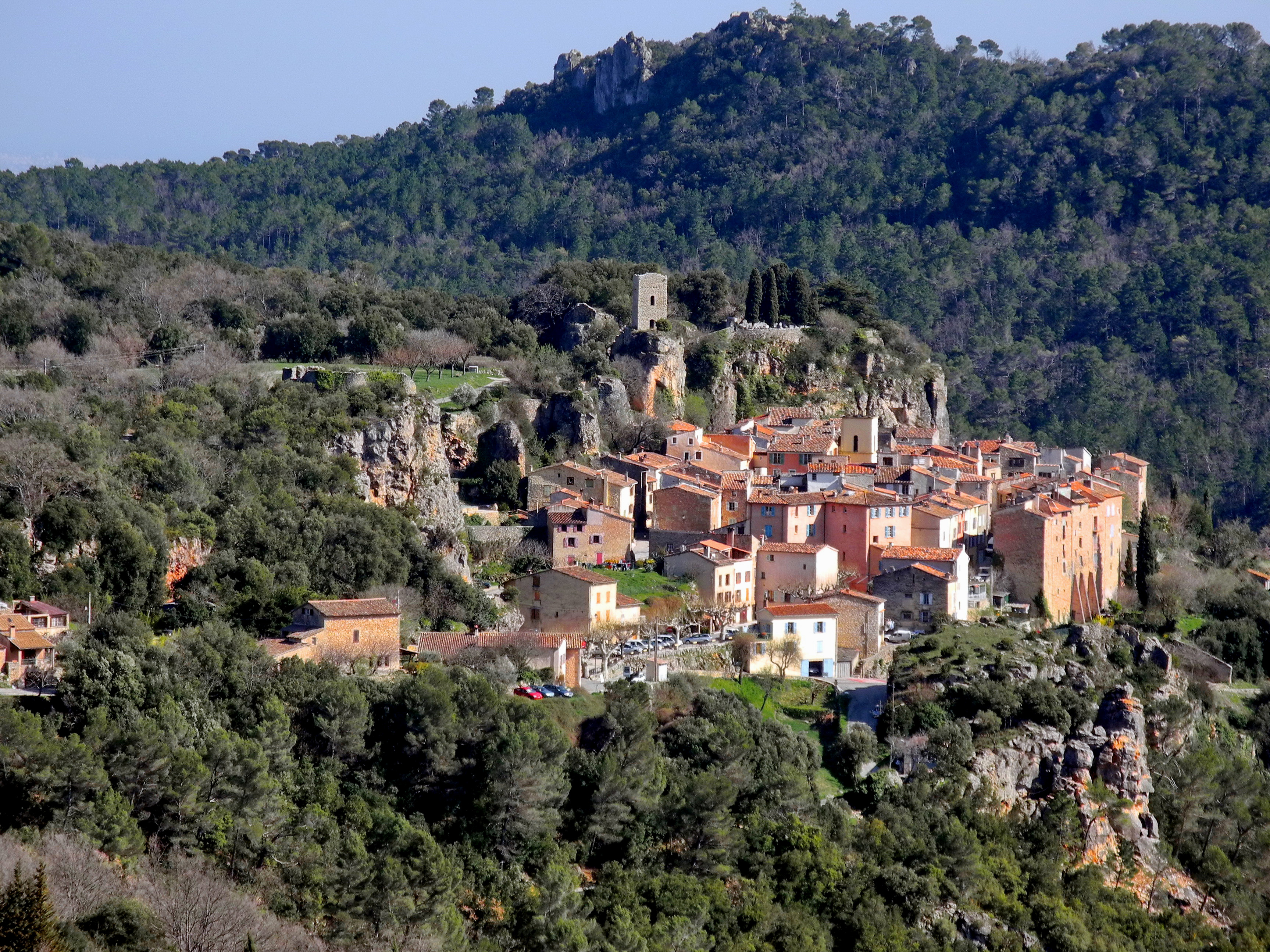 Châteaudouble, village perché du Var